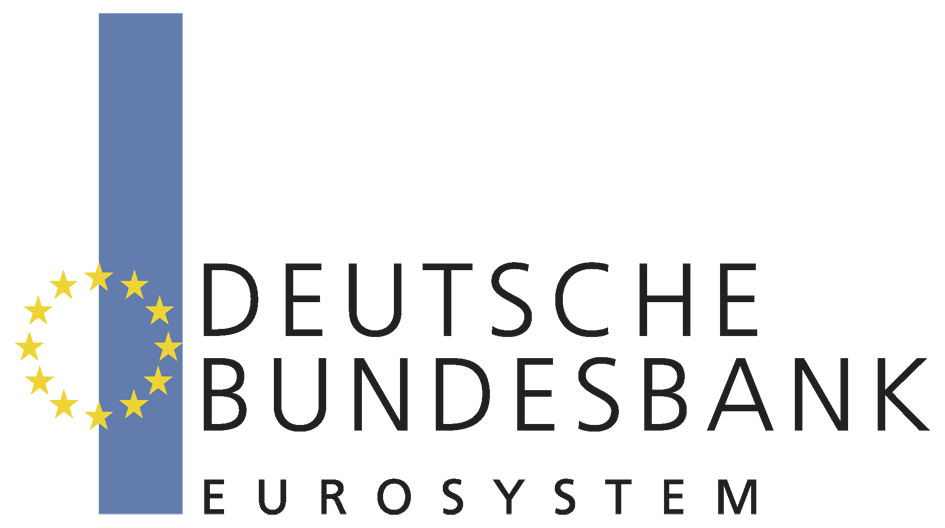 Logo of Deutsche Bundesbank, Frankfurt am Main, Germany